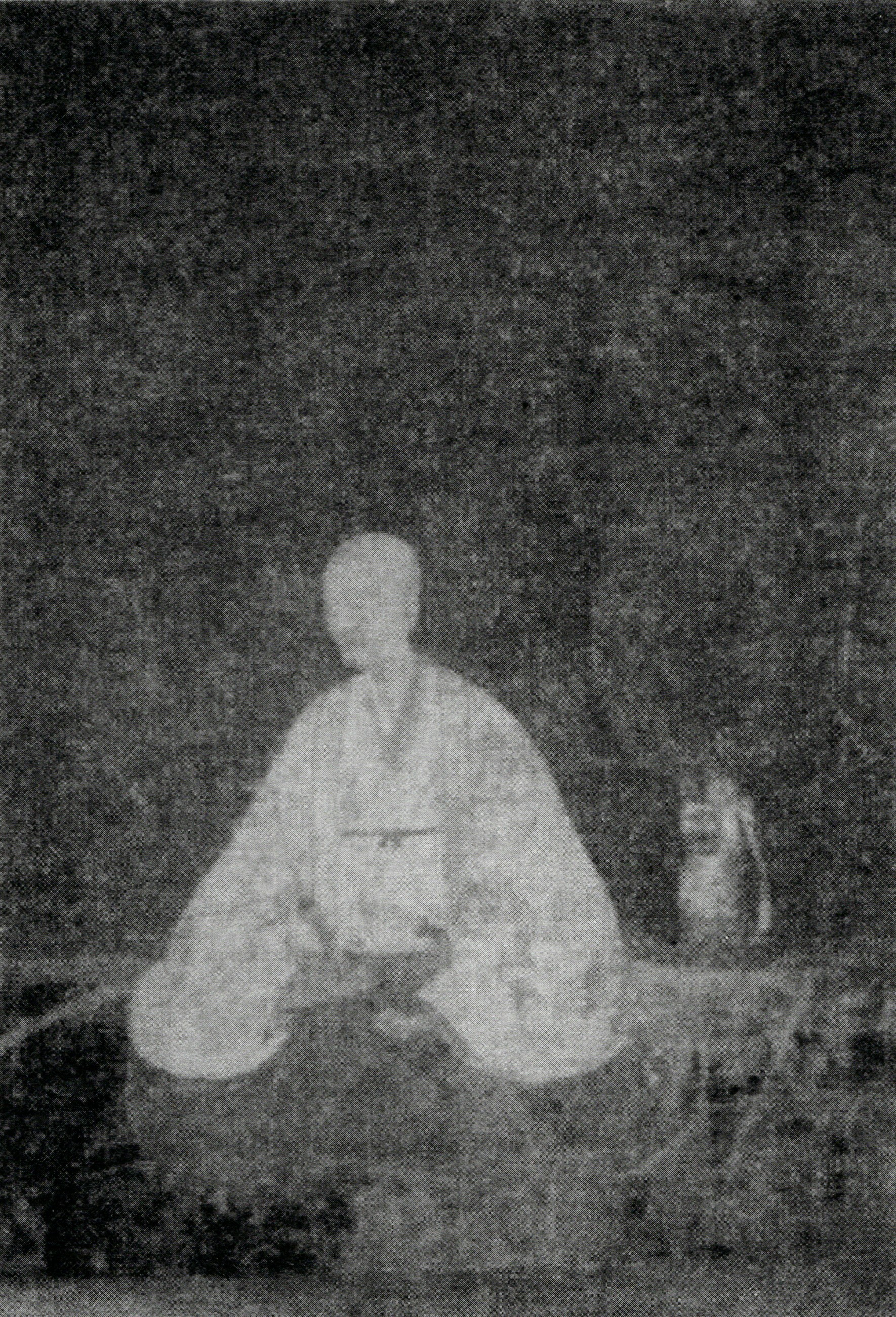 大島光義の肖像(モノクロ)。